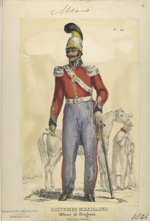 Gravure représentant un officier de dragons mexicain en 1826